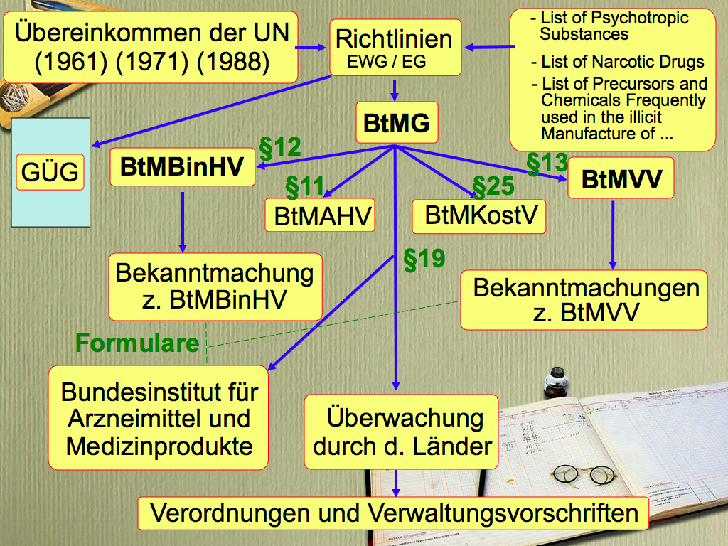 BTM-Recht in Deutschland, Germany.